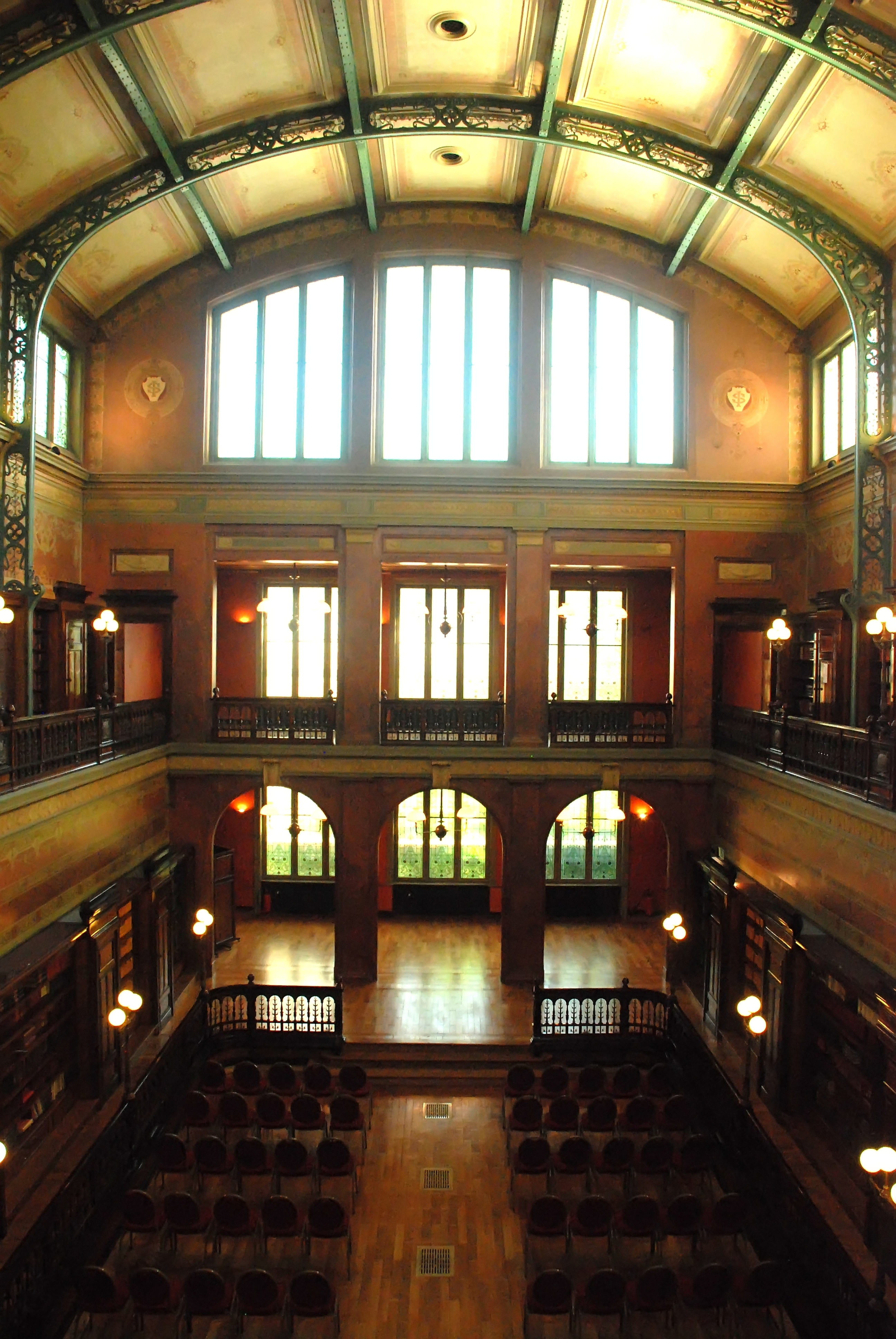 Belgique - Bruxelles - Bibliothèque Solvay